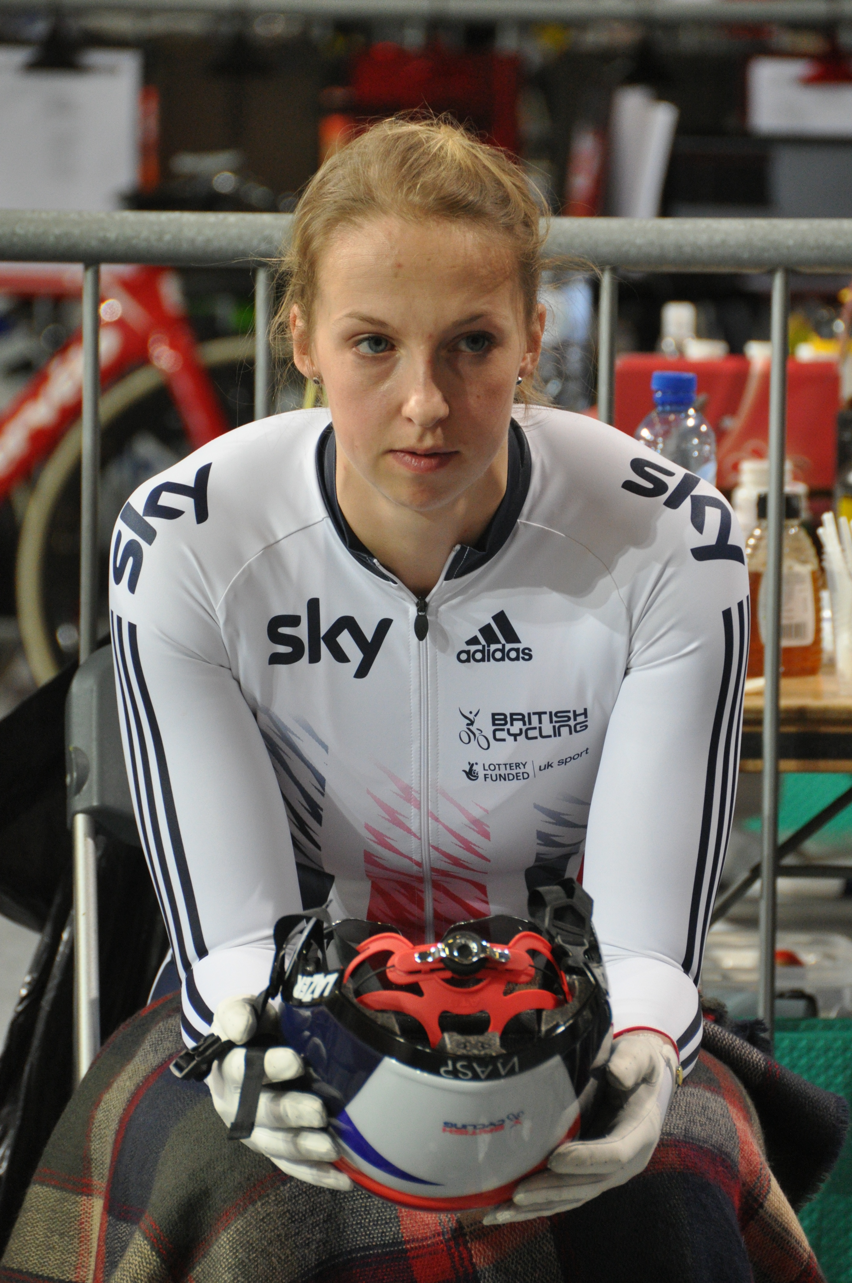 Rachel James, britische Radsportlerin